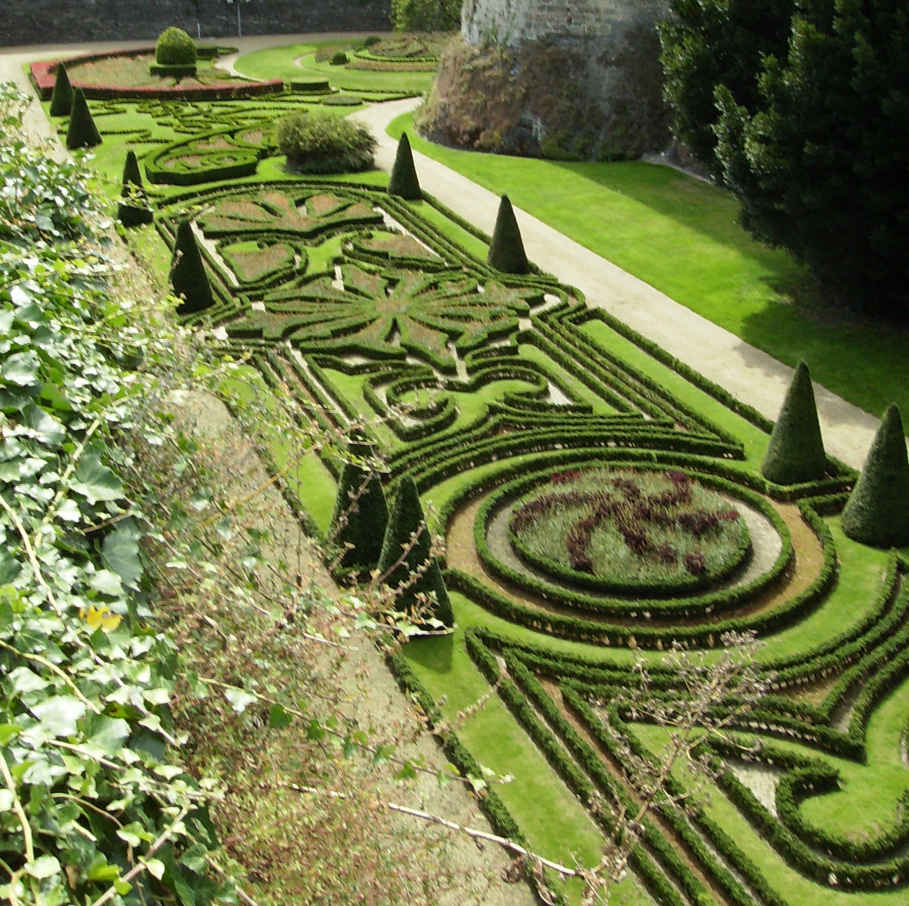 les douves du chateau d'Angers France